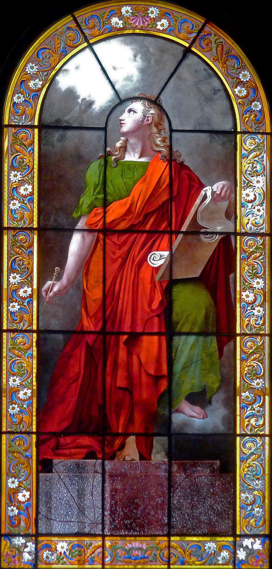 Église Sainte-Élisabeth-de-Hongrie - Paris III ; Saint-Jean l'Evangéliste ; carton de Abel de Pujol (1828) ; vitrail signé L.Lobin Tours 1883[1] .